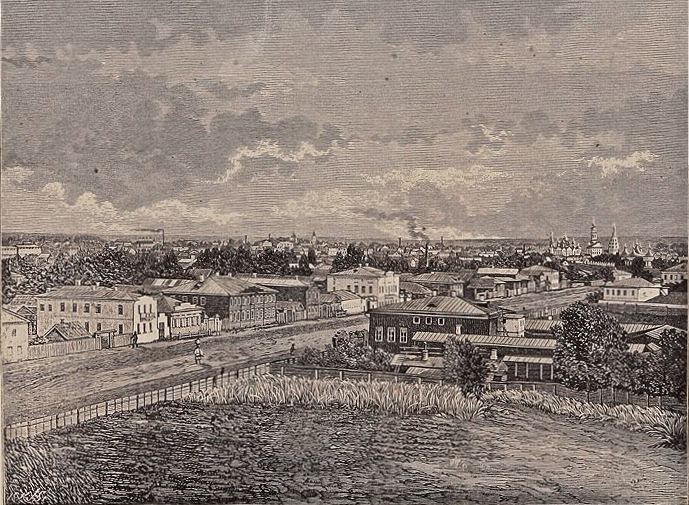 Вид города Иваново-Вознесенска с Вознесенского посада. Ксилография, 1880 г, Типография К. Ретгера в Санкт-Петербурге.